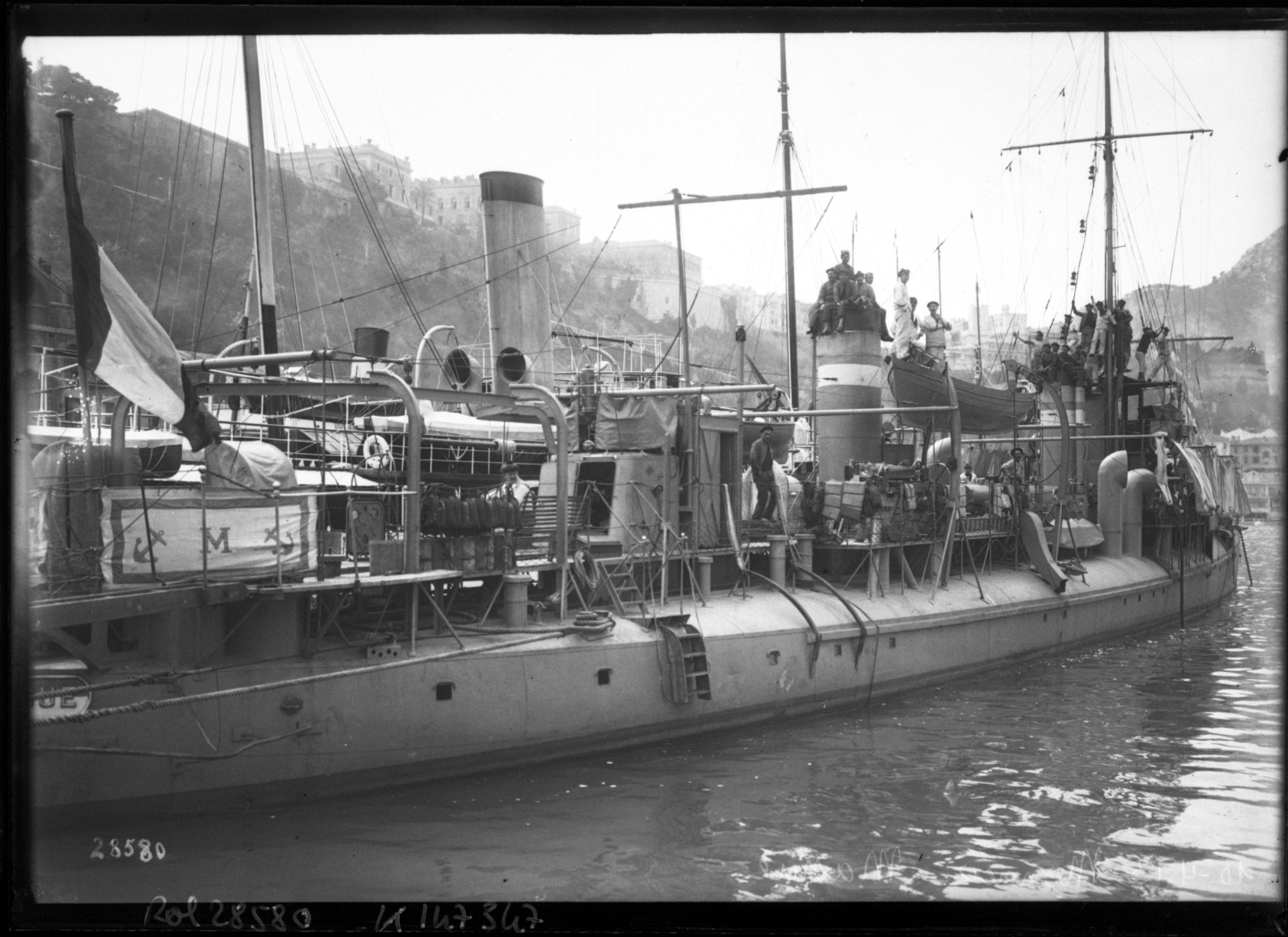 Le contre-torpilleur Massue le 10 avril 1913 à Monaco : [photographie de presse] / [Agence Rol] Notice